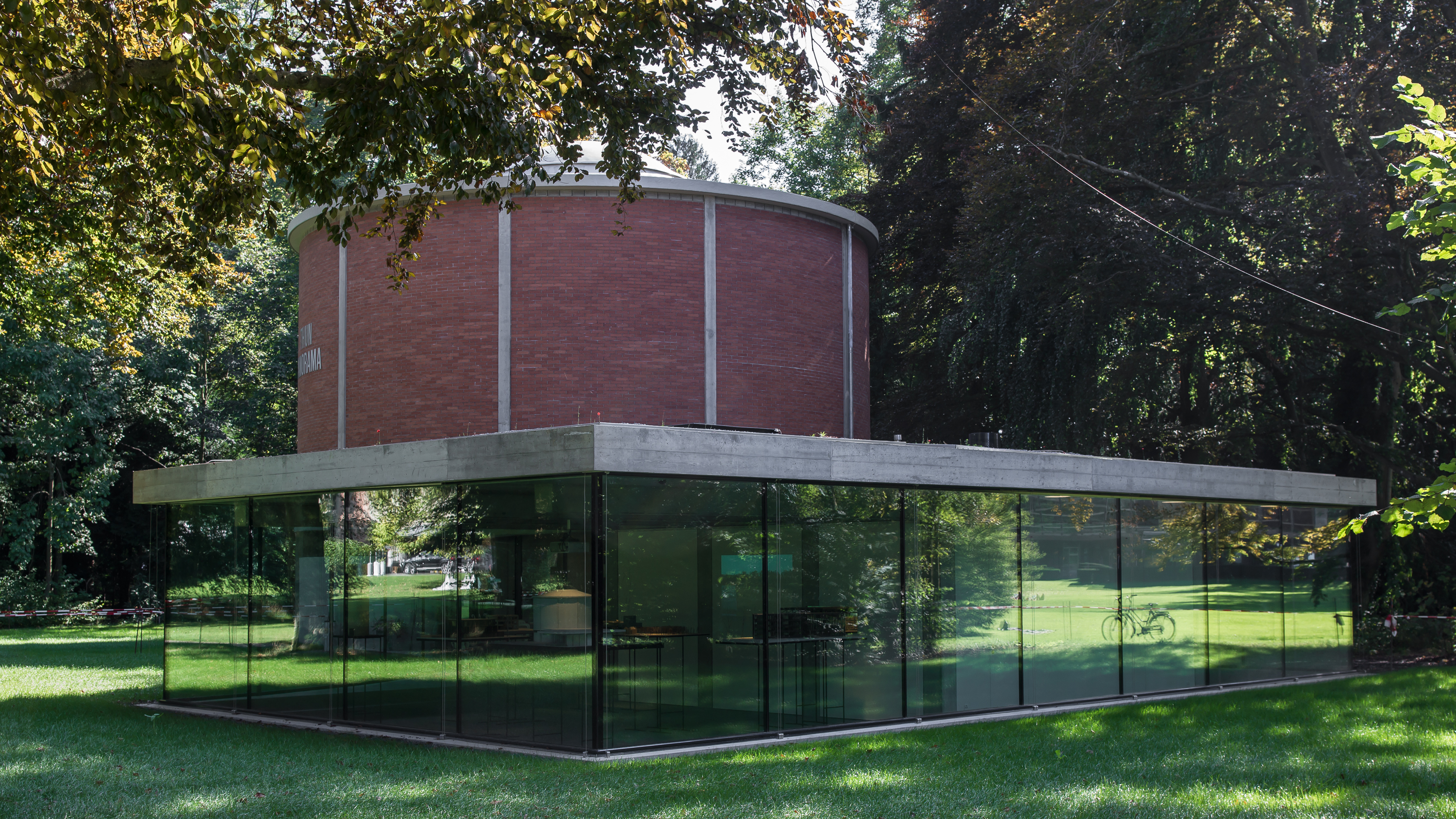 Das sog. Wocher-Panorama heisst neu Thun-Panorama, 2014 restauriert und neuen Anbau